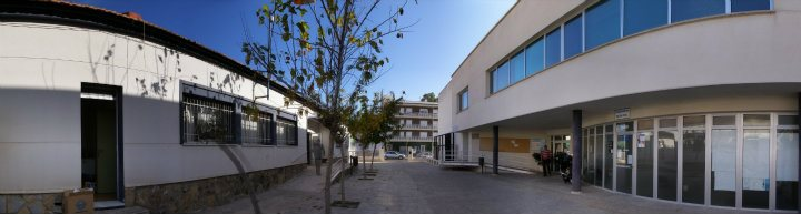 Centro social y consultorio médico